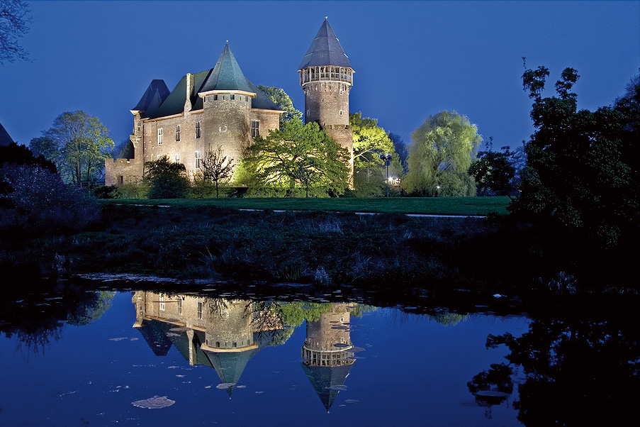 Burg Linn zur blauen Stunde.